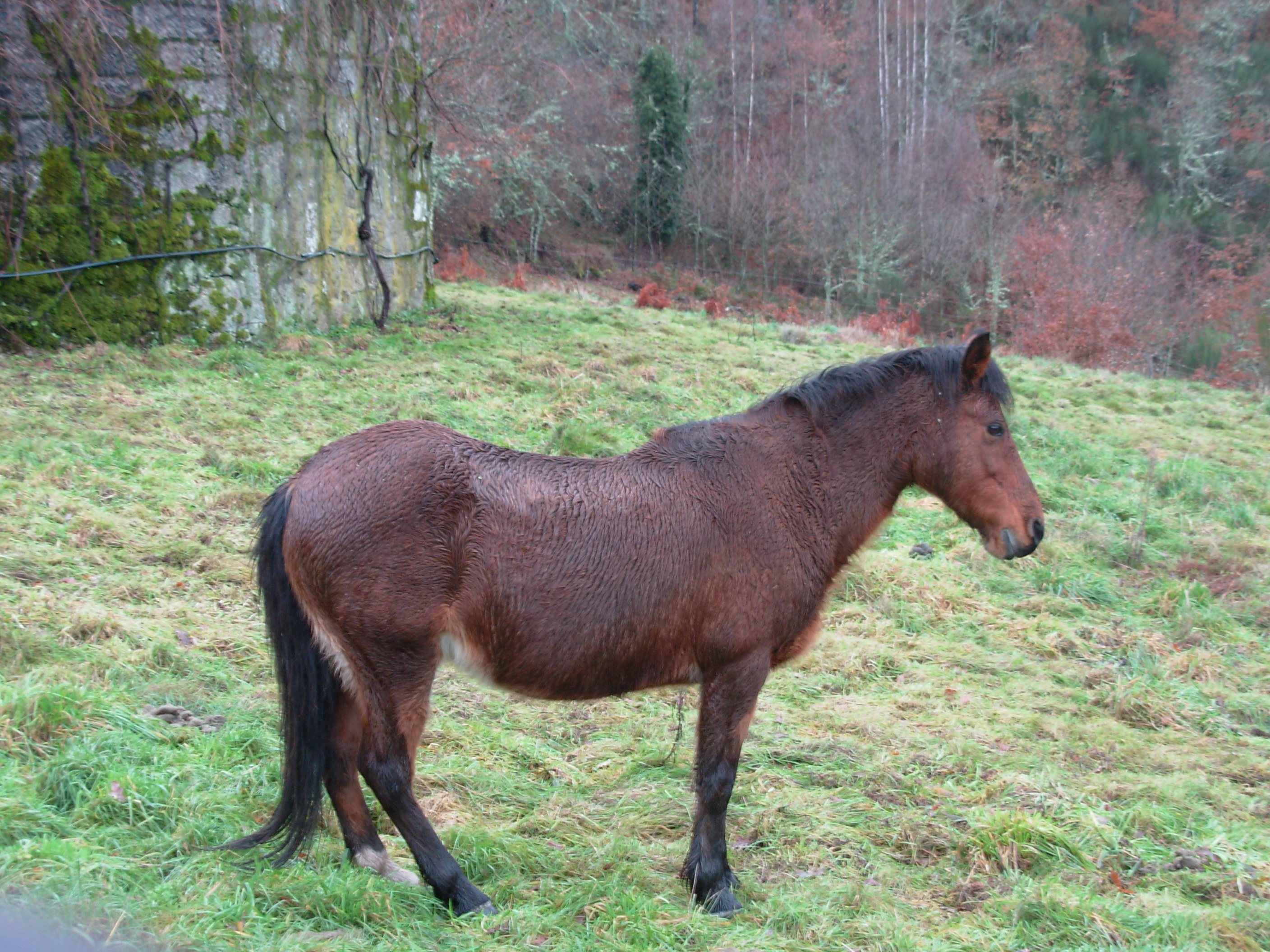 Garrano